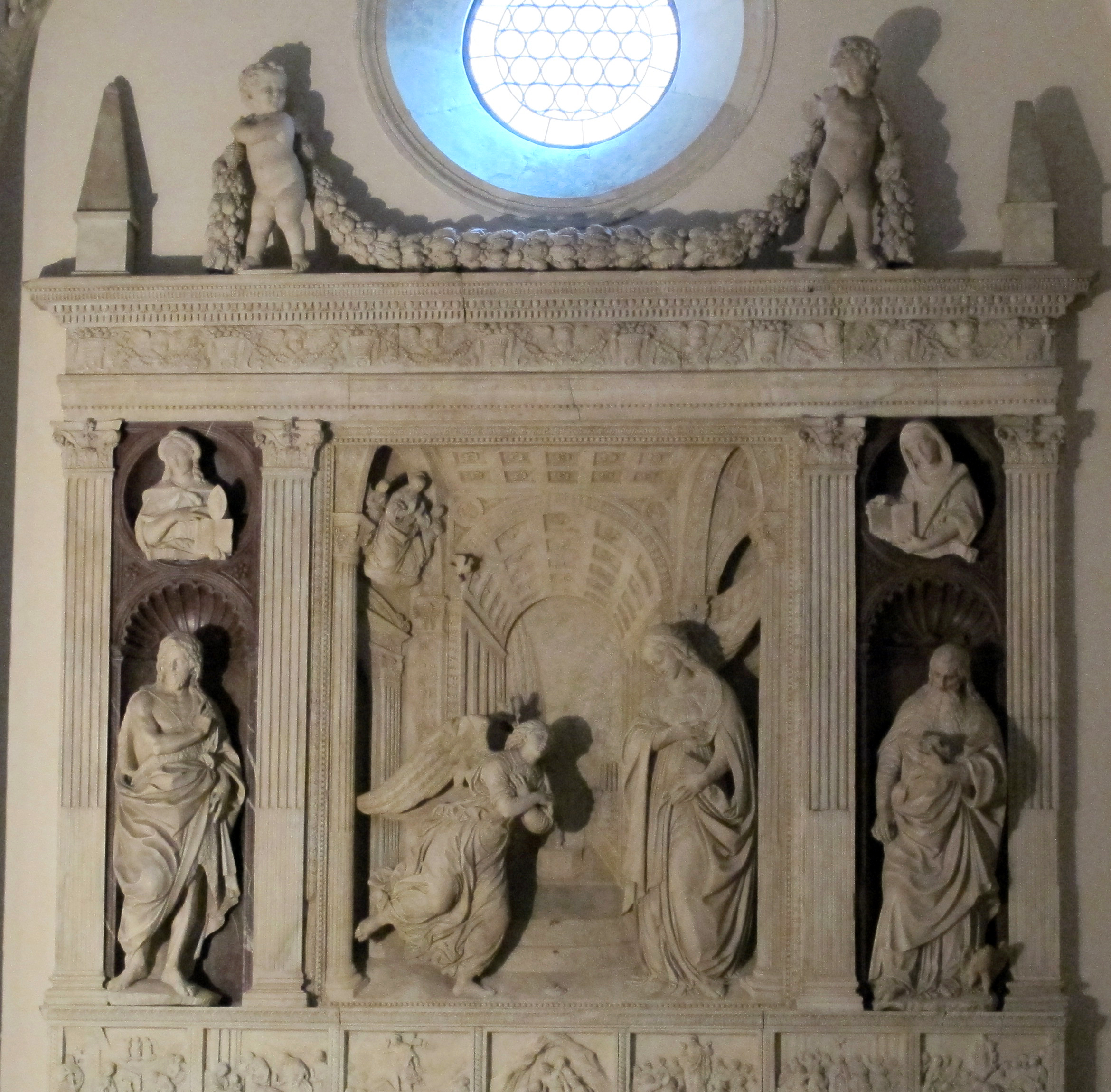 Sant'Anna dei Lombardi (Napoli)